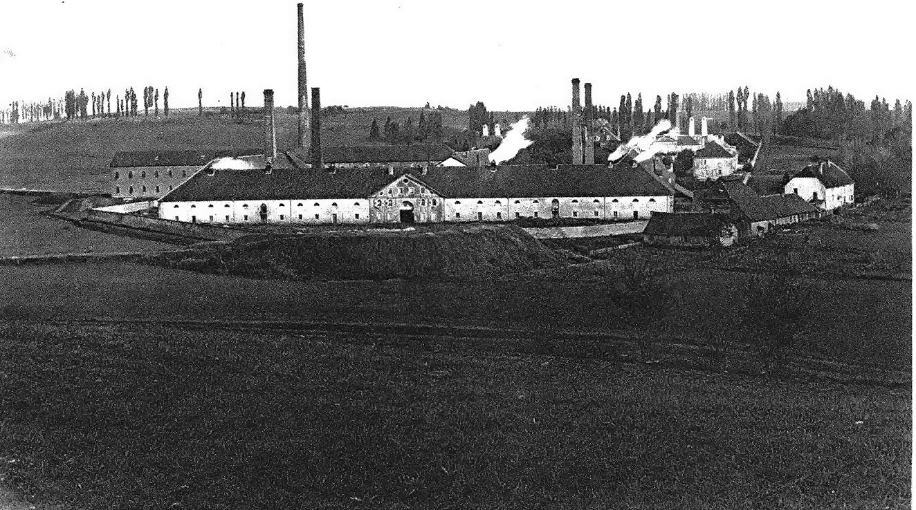 Vue générale de la saline de Gouhenans.